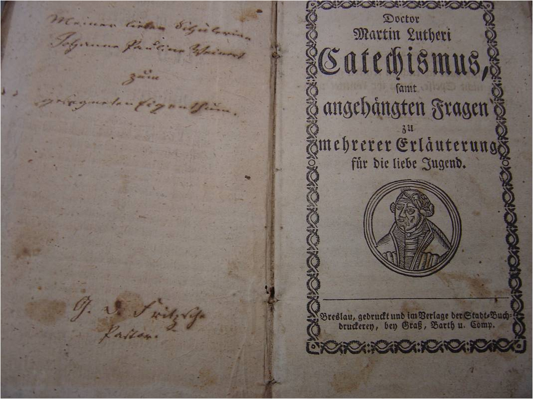 Widmung an eine Schülerin von Pastor Gotthard Fritzsche in einem Buch im Museum von Lobethal